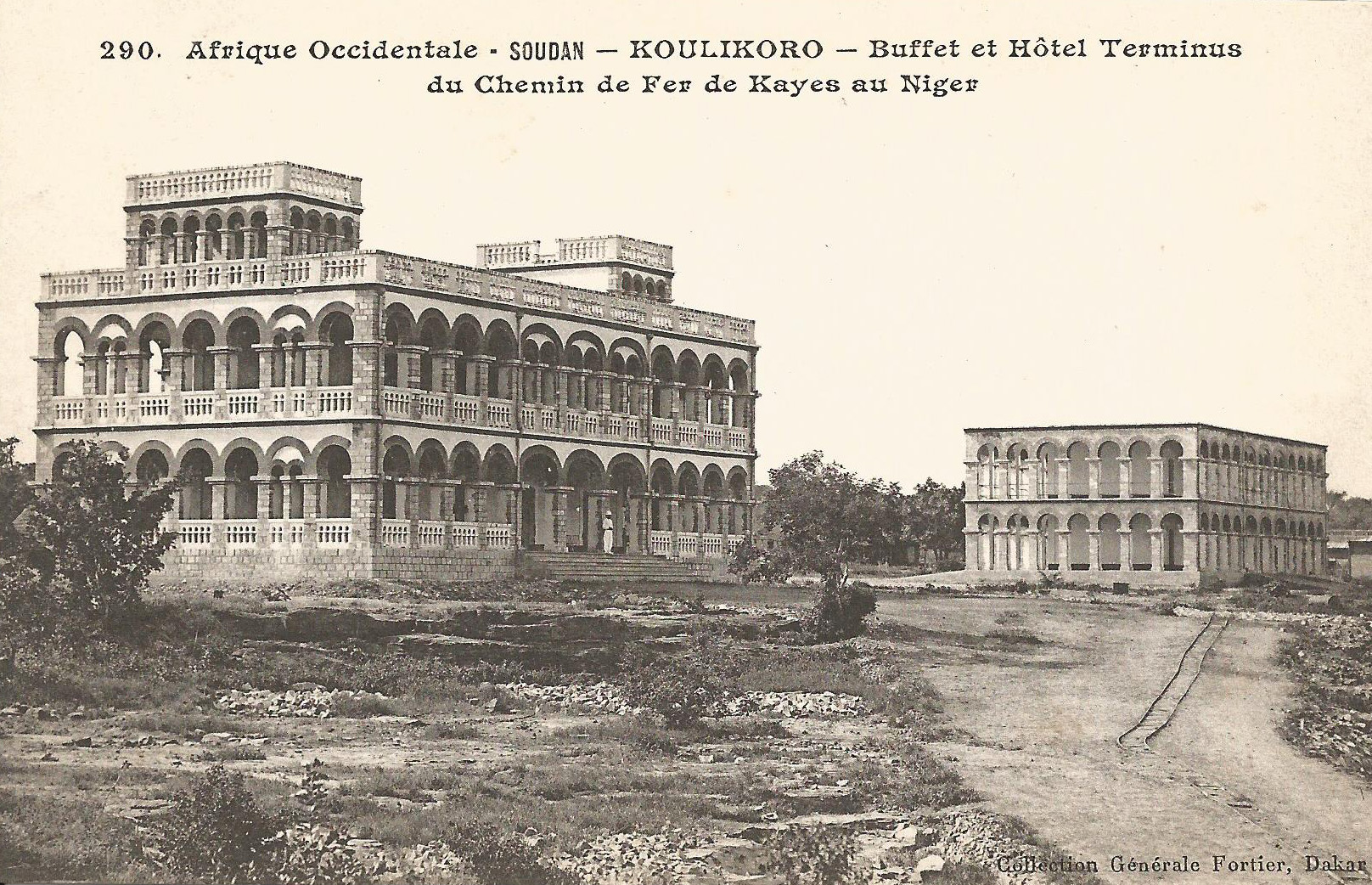 François-Edmond Fortier, Koulikoro-Buffet et Hôtel Terminus. Afrique Occidentale - Soudan - Chemin de fer de Kayes au Niger.